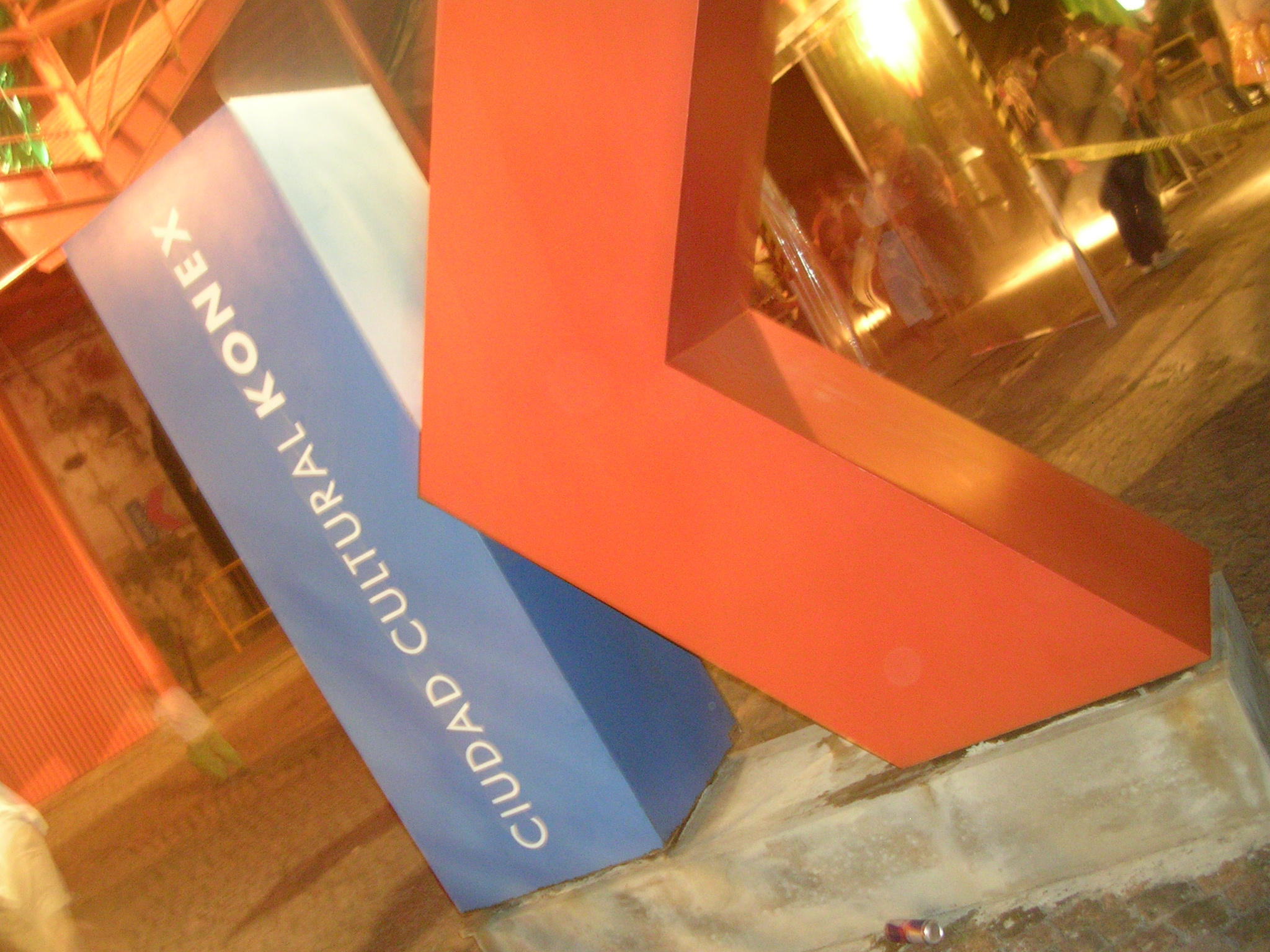 Centro Cultural Konex